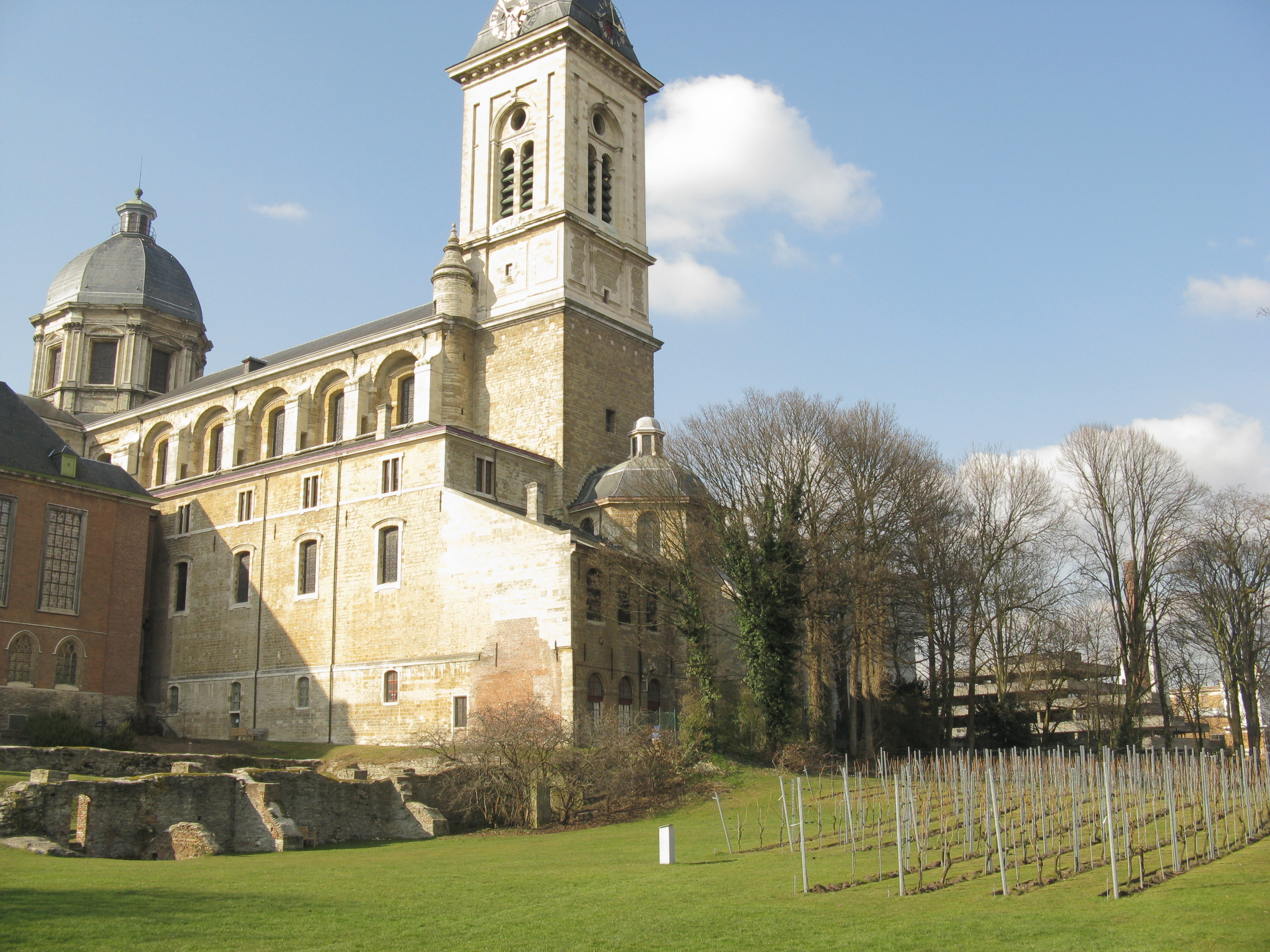 Wijngaard van de Sint-Pietersabdij in Gent, België.